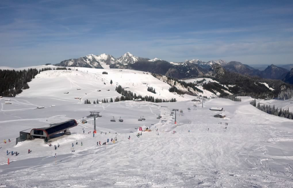 Loferer Alm